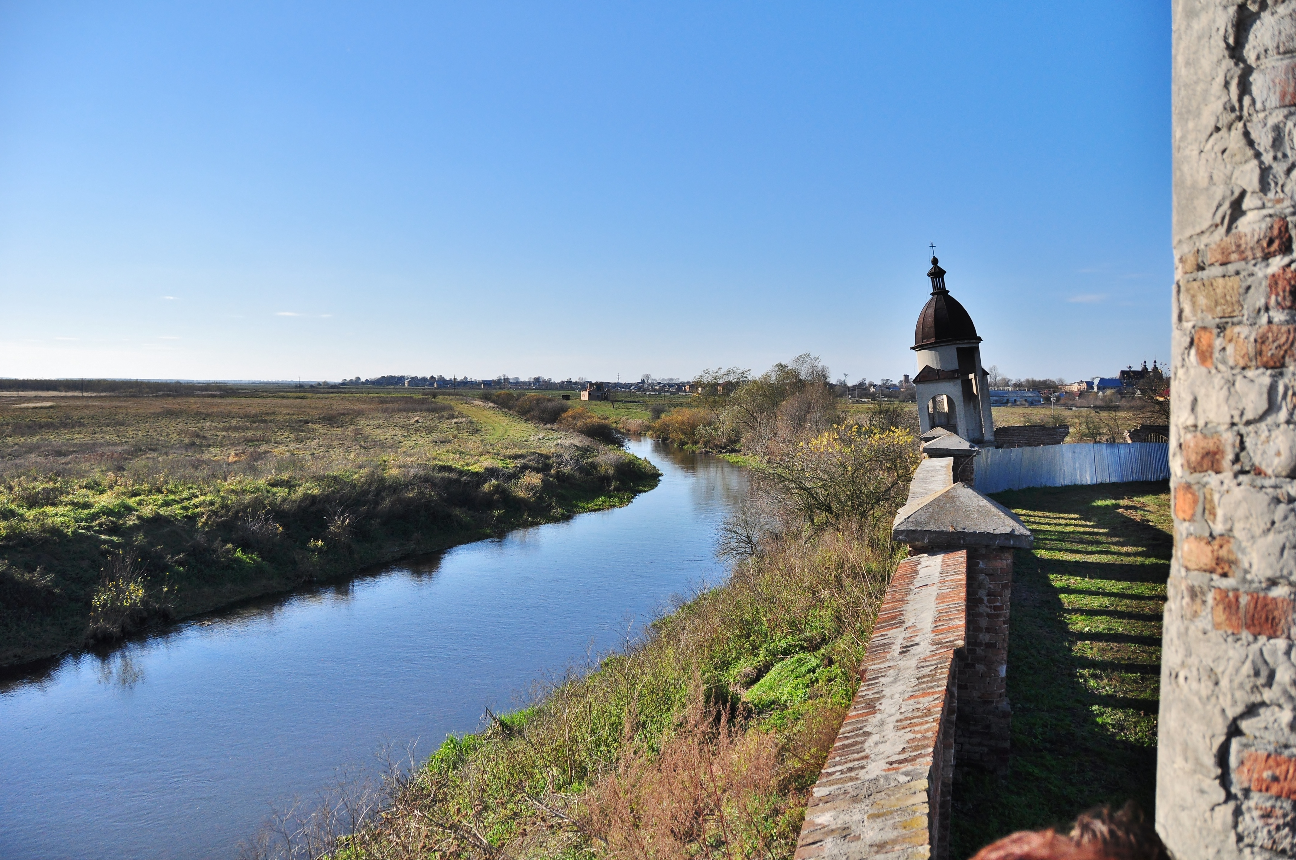 Річка Солокія поза муром урочища Замочок у Белзі